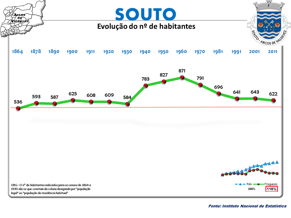 Censos 1864/2011